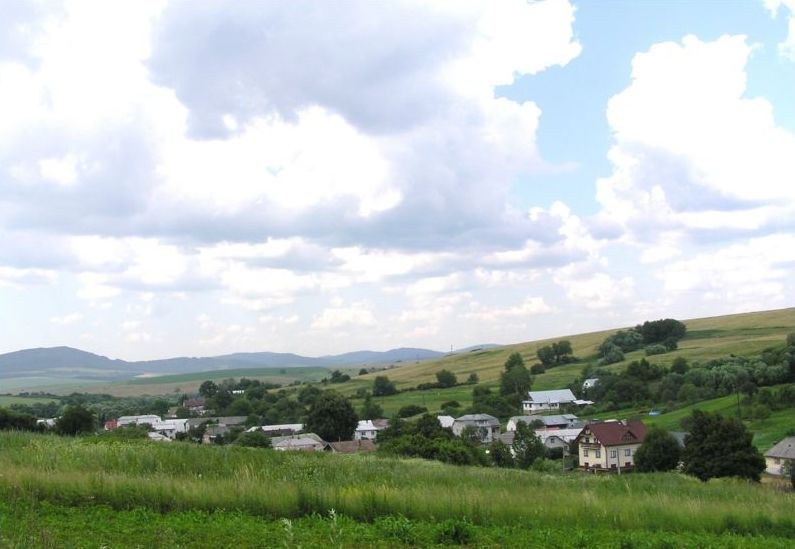 Celkový pohľad